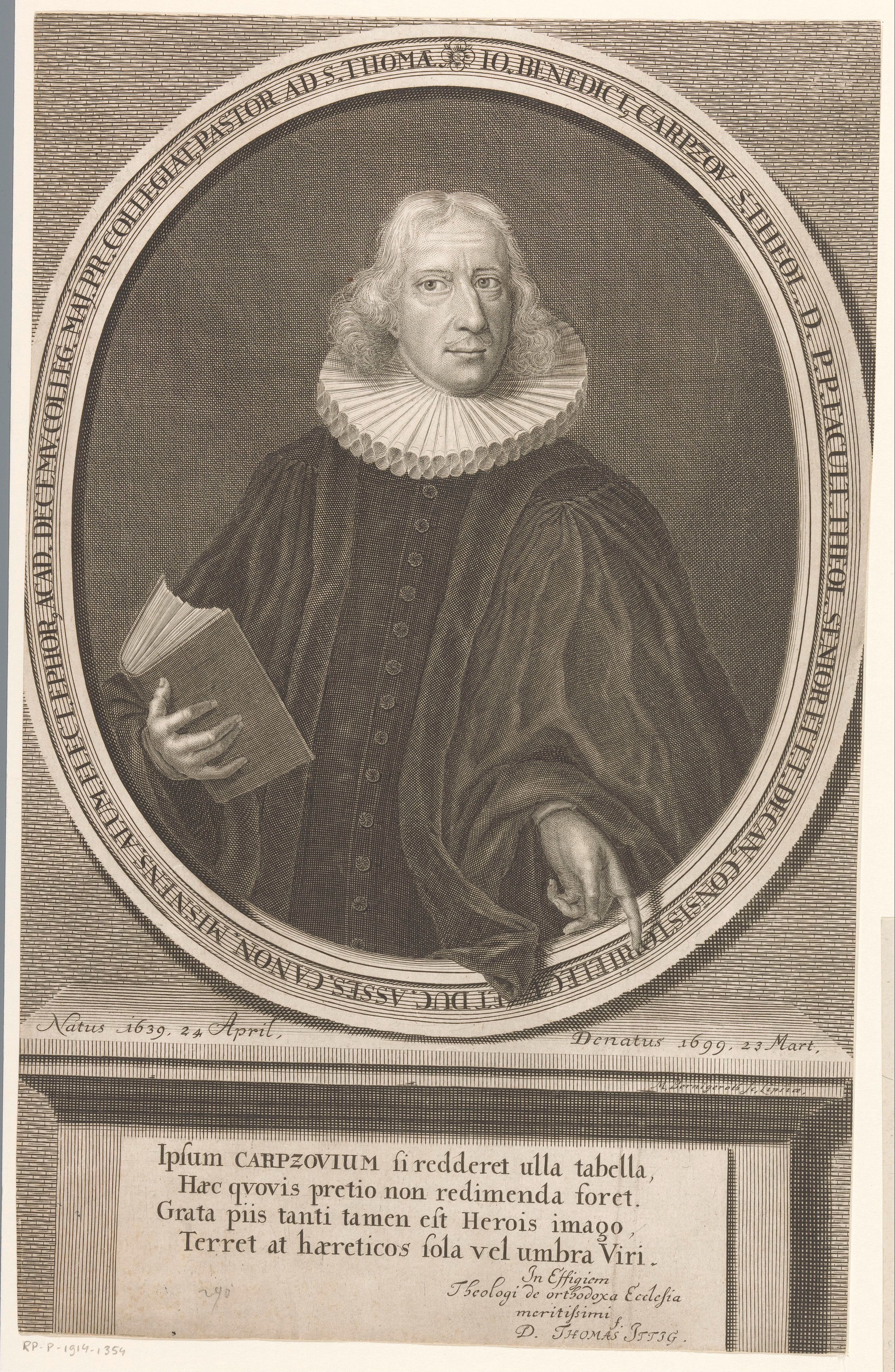 IdentificatieTitel(s): Portret van Johann Benedict CarpzovObjecttype: prent Objectnummer: RP-P-1914-1354Catalogusreferentie: HAB A 25651Opschriften / Merken: verzamelaarsmerk, verso, gestempeld: Lugt 2228VervaardigingVervaardiger: prentmaker: Martin Bernigeroth (vermeld op object)schrijver: Thomas Ittig (vermeld op object)Plaats vervaardiging: LeipzigDatering: 1699 - 1733Fysieke kenmerken: gravureMateriaal: papier Techniek: graveren (drukprocedé)Afmetingen: blad: h 332 mm × b 209 mmOnderwerpWat: historical personsbookWie: Johann Benedikt CarpzovVerwerving en rechtenVerwerving: aankoop 1905Copyright: Publiek domein